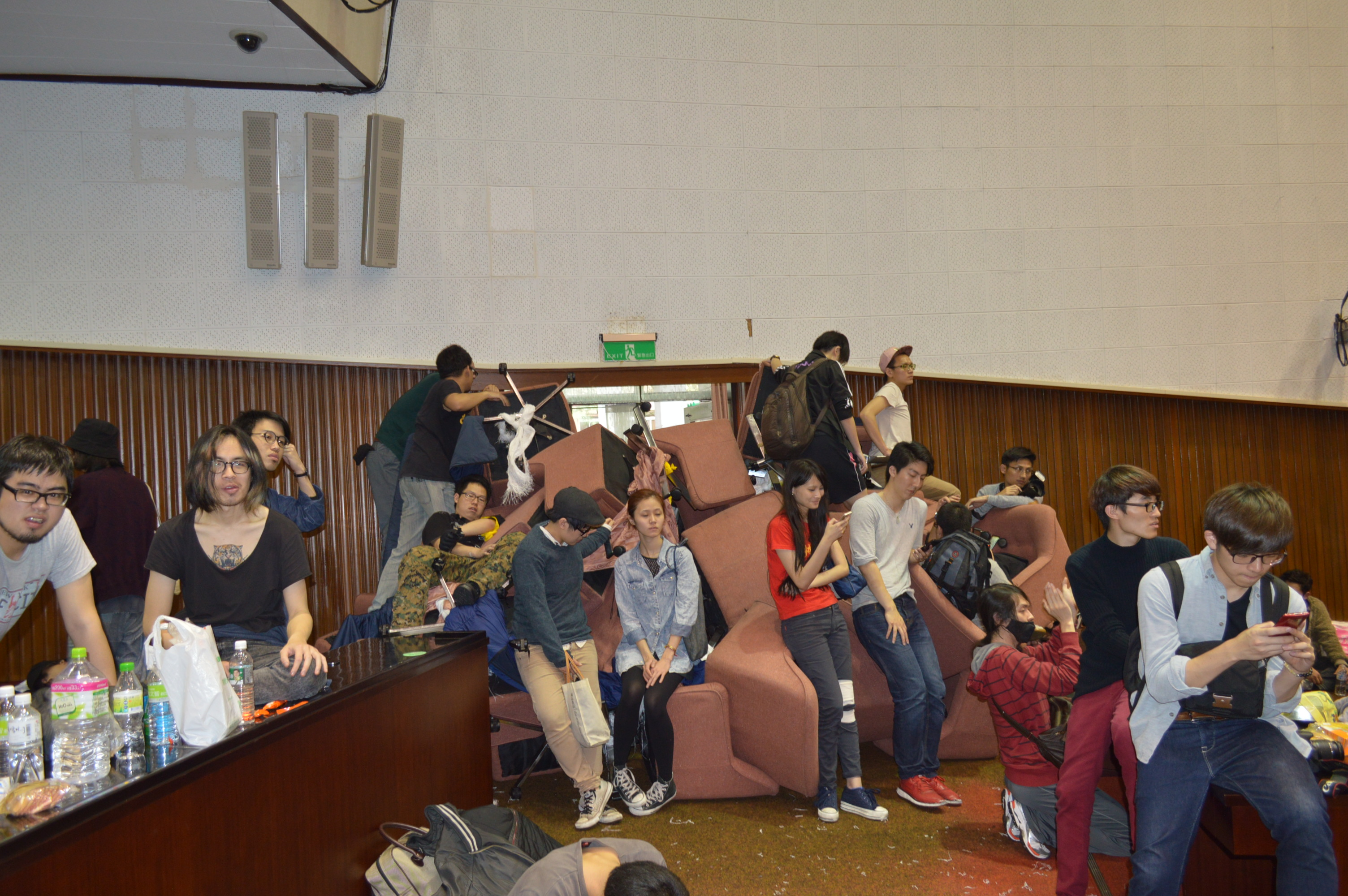 堵住出口不讓警察進去。